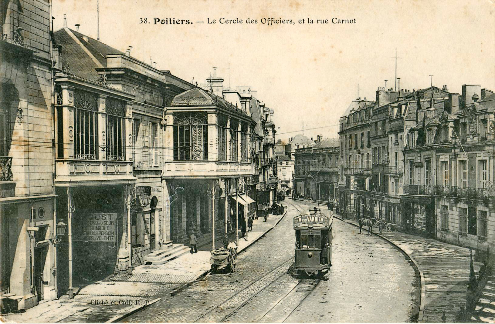 Carte postale ancienne éditée par R. P., n°38 : POITIERS - Le Cercle des Officiers, et la rue Carnot